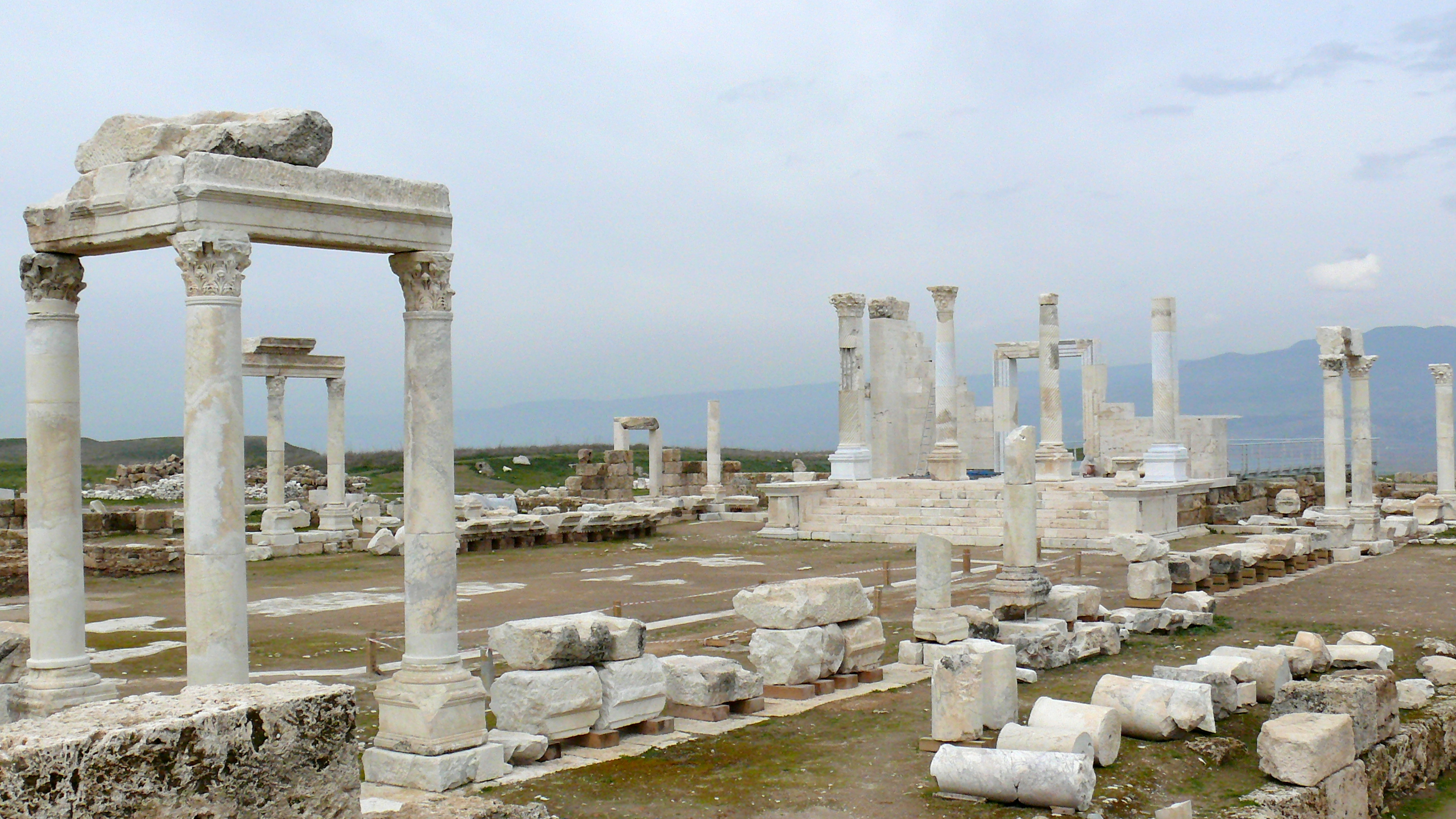 Wieder aufgerichtete Reste eines repräsentativen Bauwerks in Laodikeia